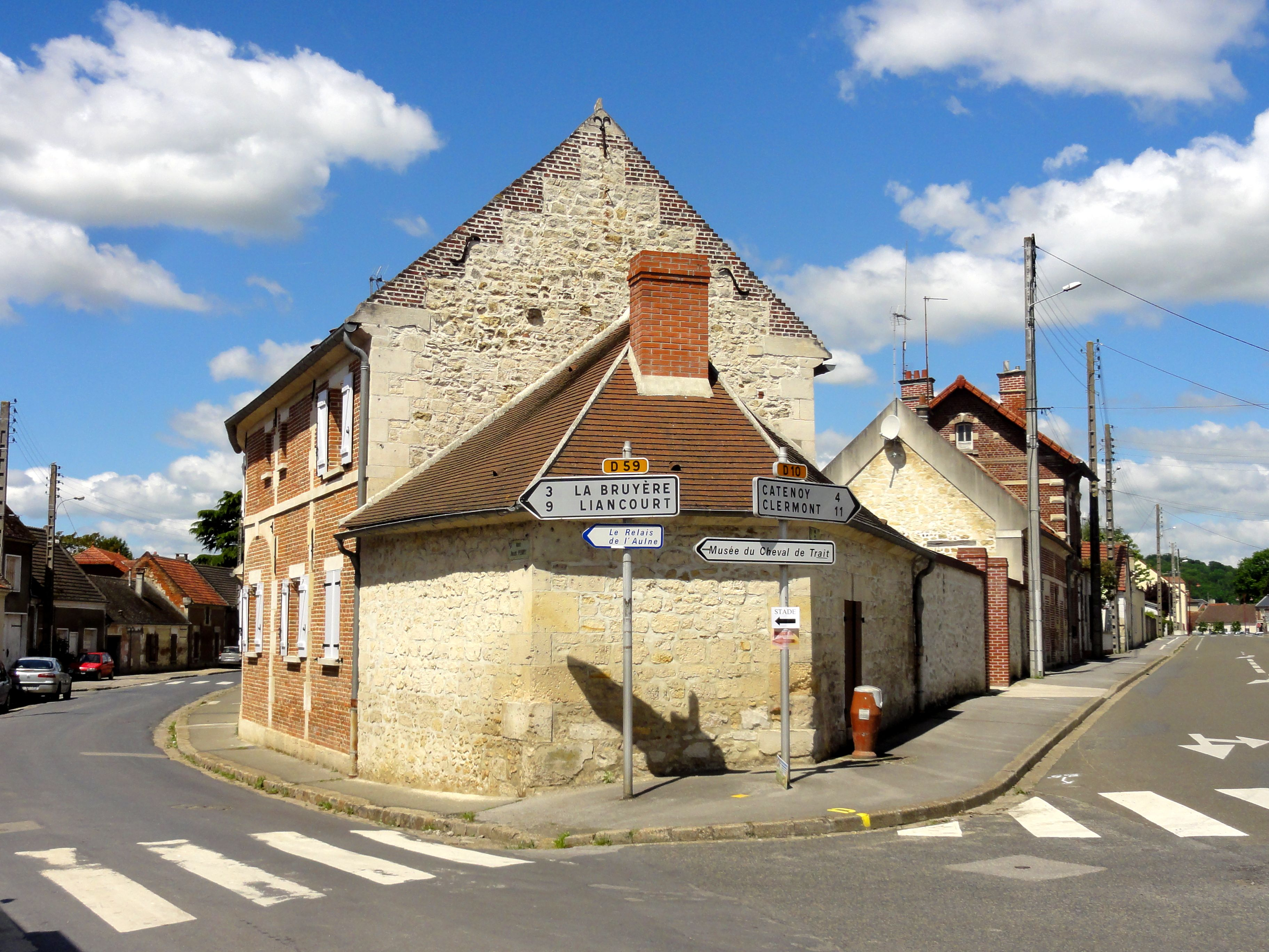 Bifurcation des rues Jules-Ferry (à gauche) et du général de Gaulle (à droite).